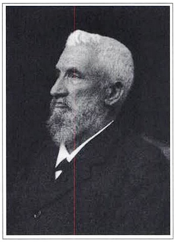 Carl Friedrich Heman (1839-1919), geboren in Grünstadt, Philosophieprofessor in Basel